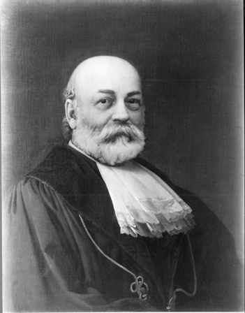 Gustav Hartmann; Gemälde der Professorengalerie der Eberhard Karls Universität Tübingen